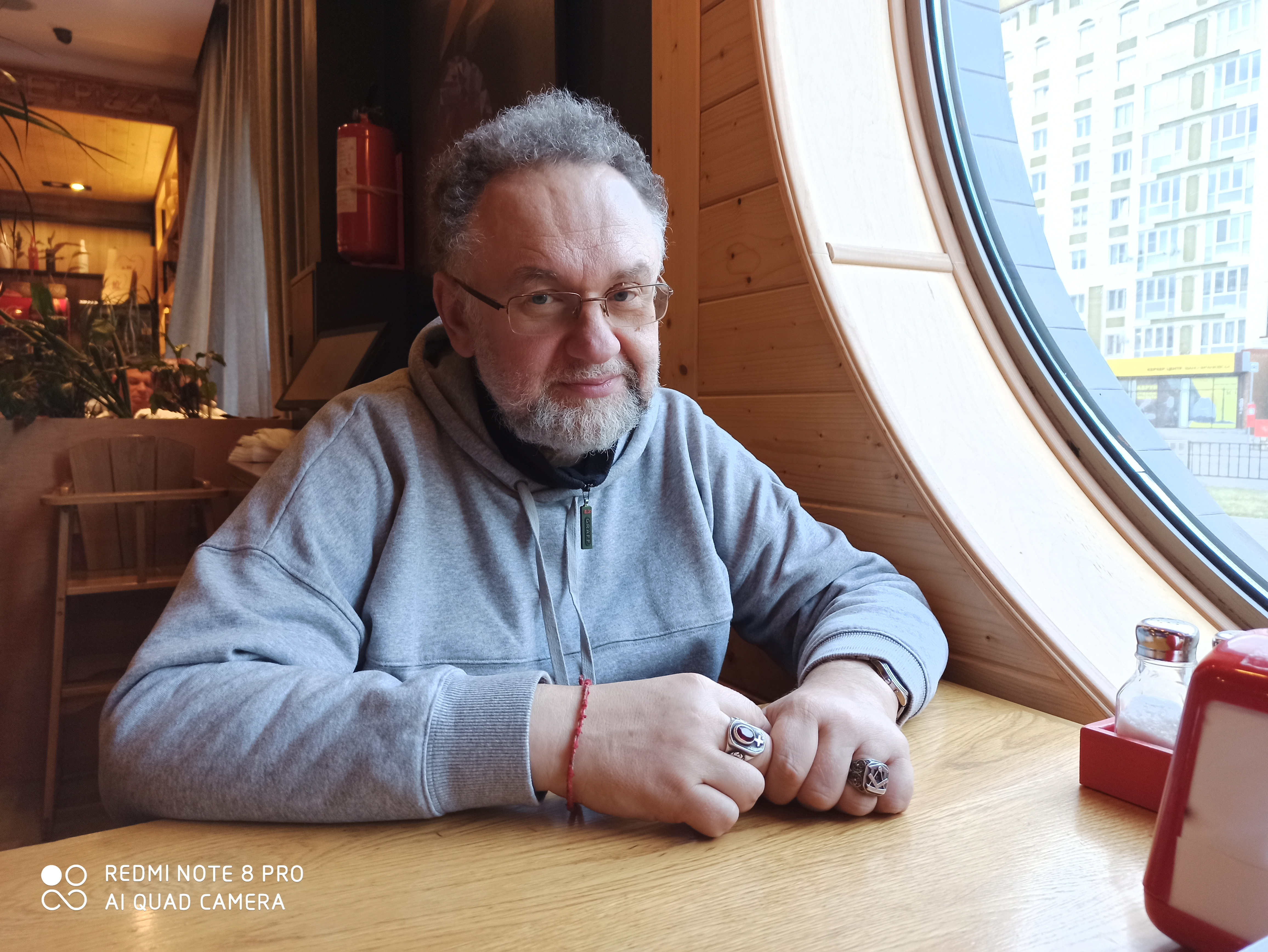 Владимир Ешкилев